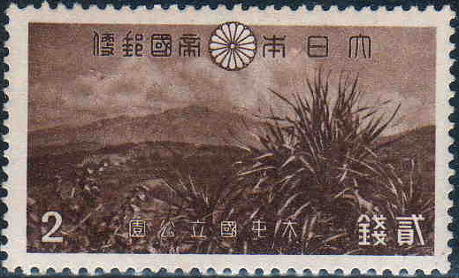 台湾を植民地にしていた時期に日本が設置していた大屯国立公園のうち大屯山を描く2銭切手。